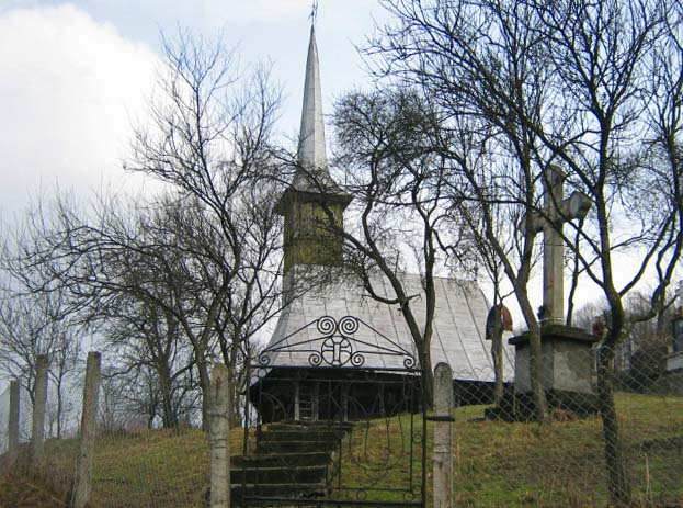 Biserica de lemn din Var, Sălaj. Foto: Mihai Petriş, 2007. Categorie:Biserici de lemn din Sălaj (imagini)